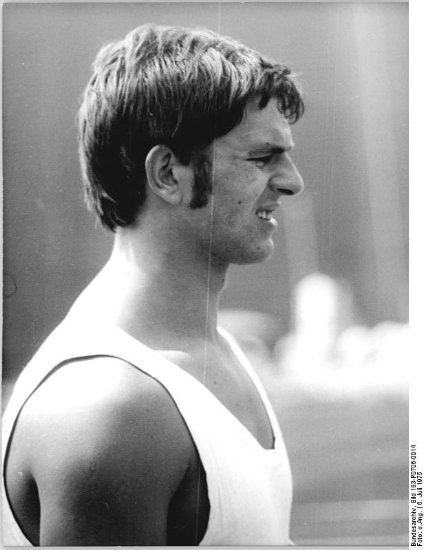 Dieter Krüger ADN-ZB ZB-6.7.75 Potsdam: Titel im Zehnkampf Der Magdeburger Dieter Krüger holte sich am 6.7.1975 bei den DDR-Meisterschaften im Leichtathletischen Mehrkampf in der Havelstadt mit 8091 Punkten den Titel im Zehnkampf. - Archivfoto